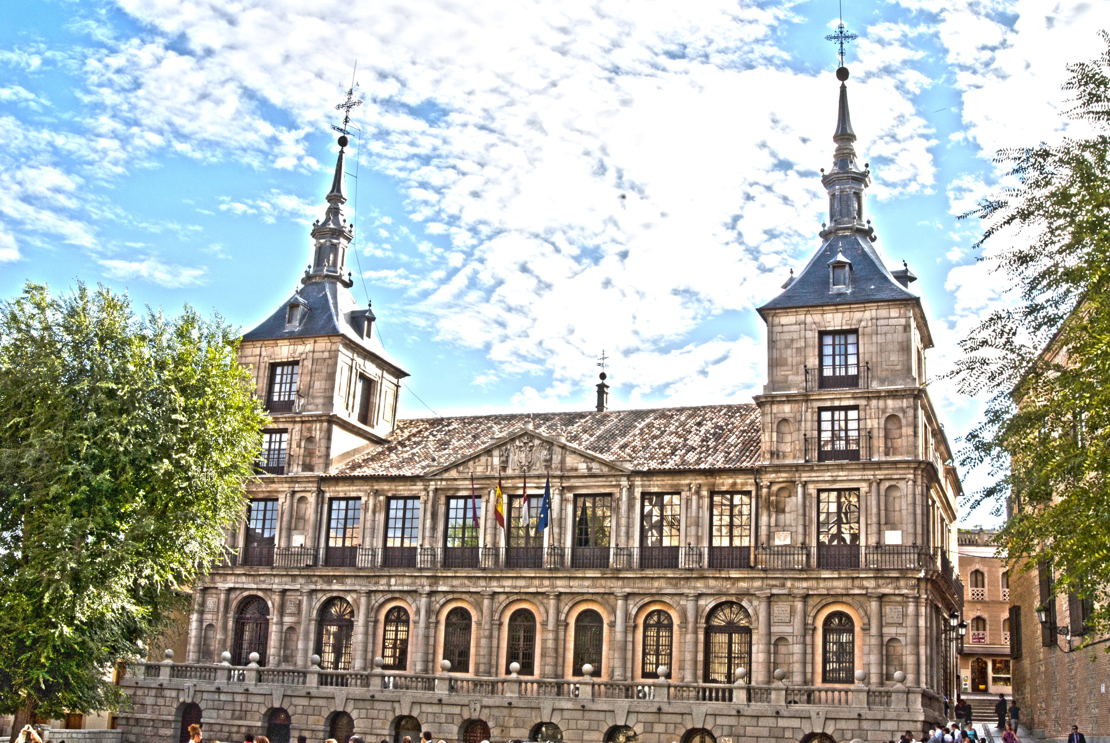 Fotografía tratada en HDR para enfatizar con mayor intensidad la riqueza de detalles.